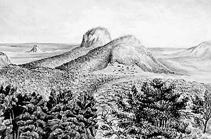 Окрестности Железноводска, рисунок